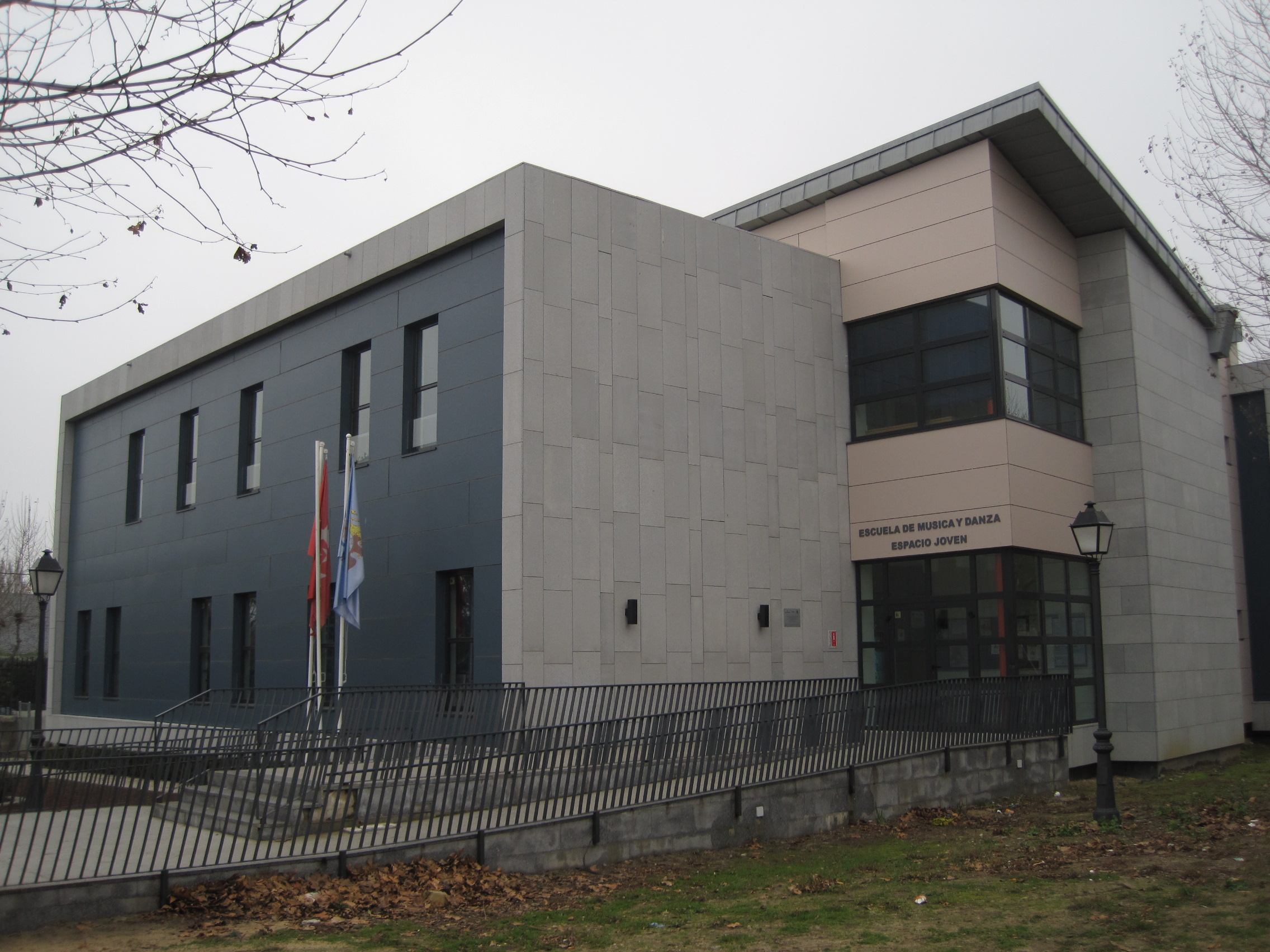 Escuela de música y danza en la localidad de El Escorial (Madrid, España).